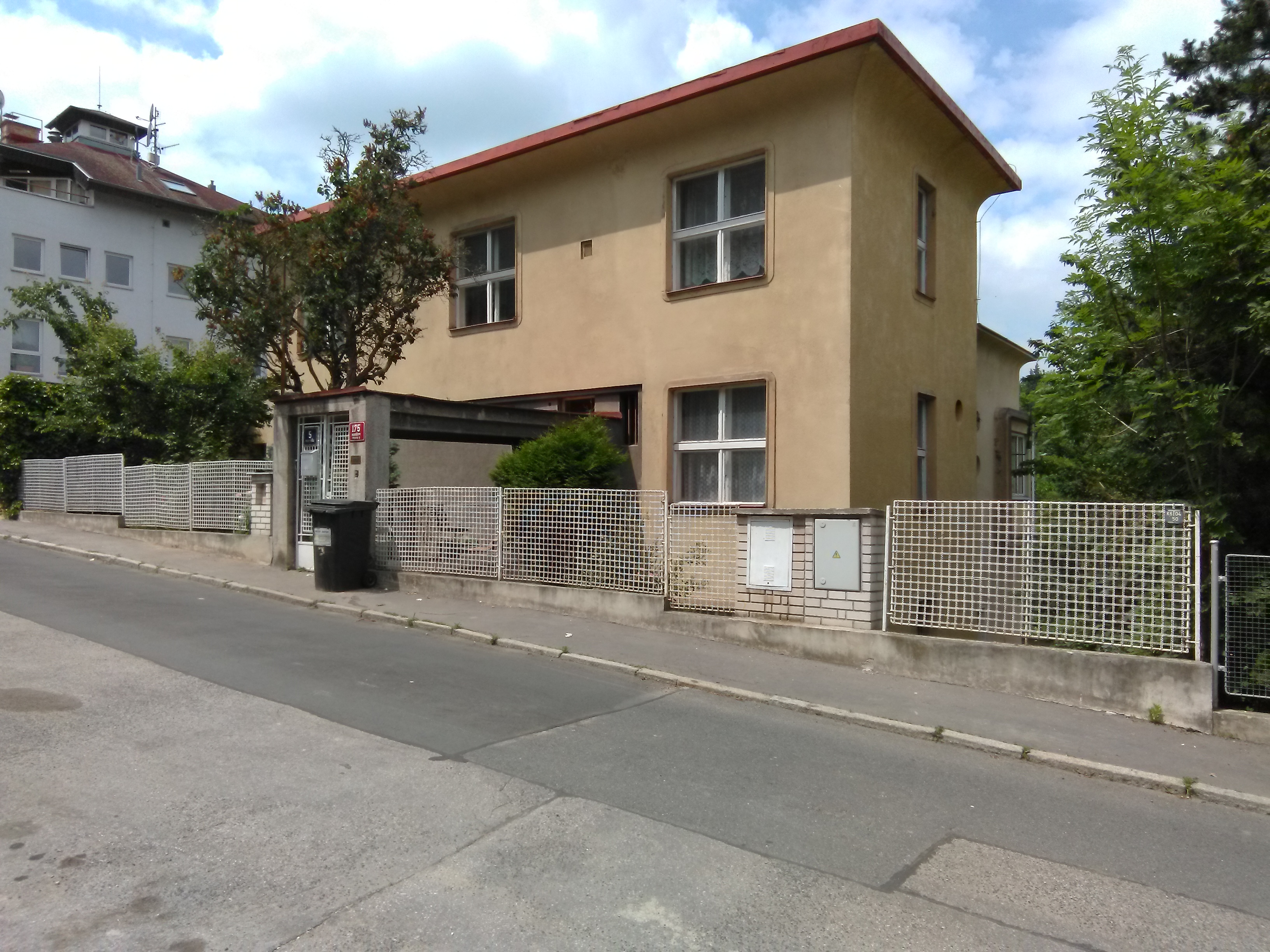 Pod Habrovou 175/5, Praha 5-Hlubočepy. Arch. Kurt Spielmann, 1931.